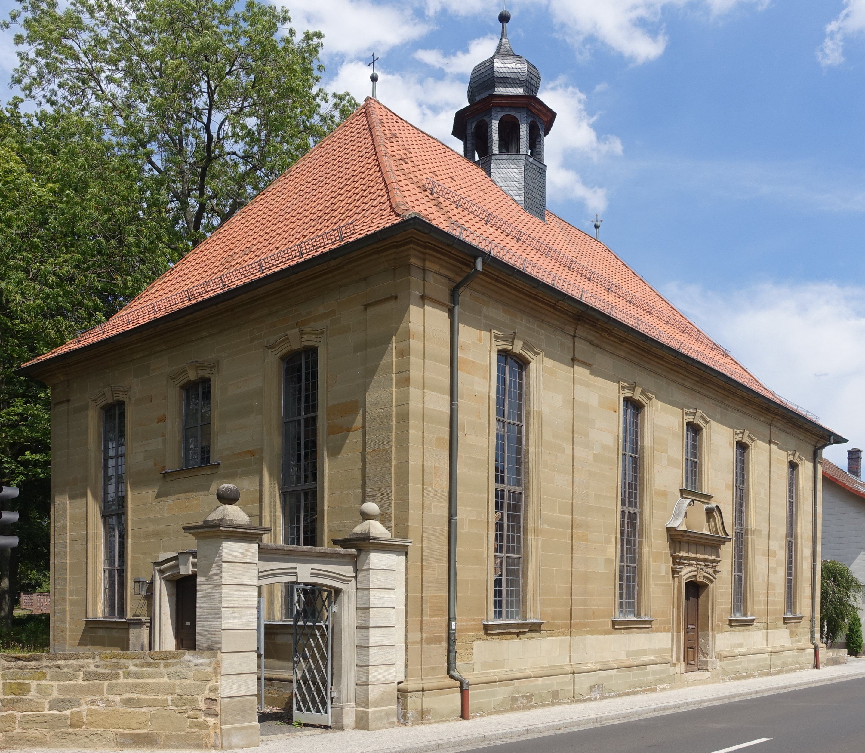 Blick auf die Kirche